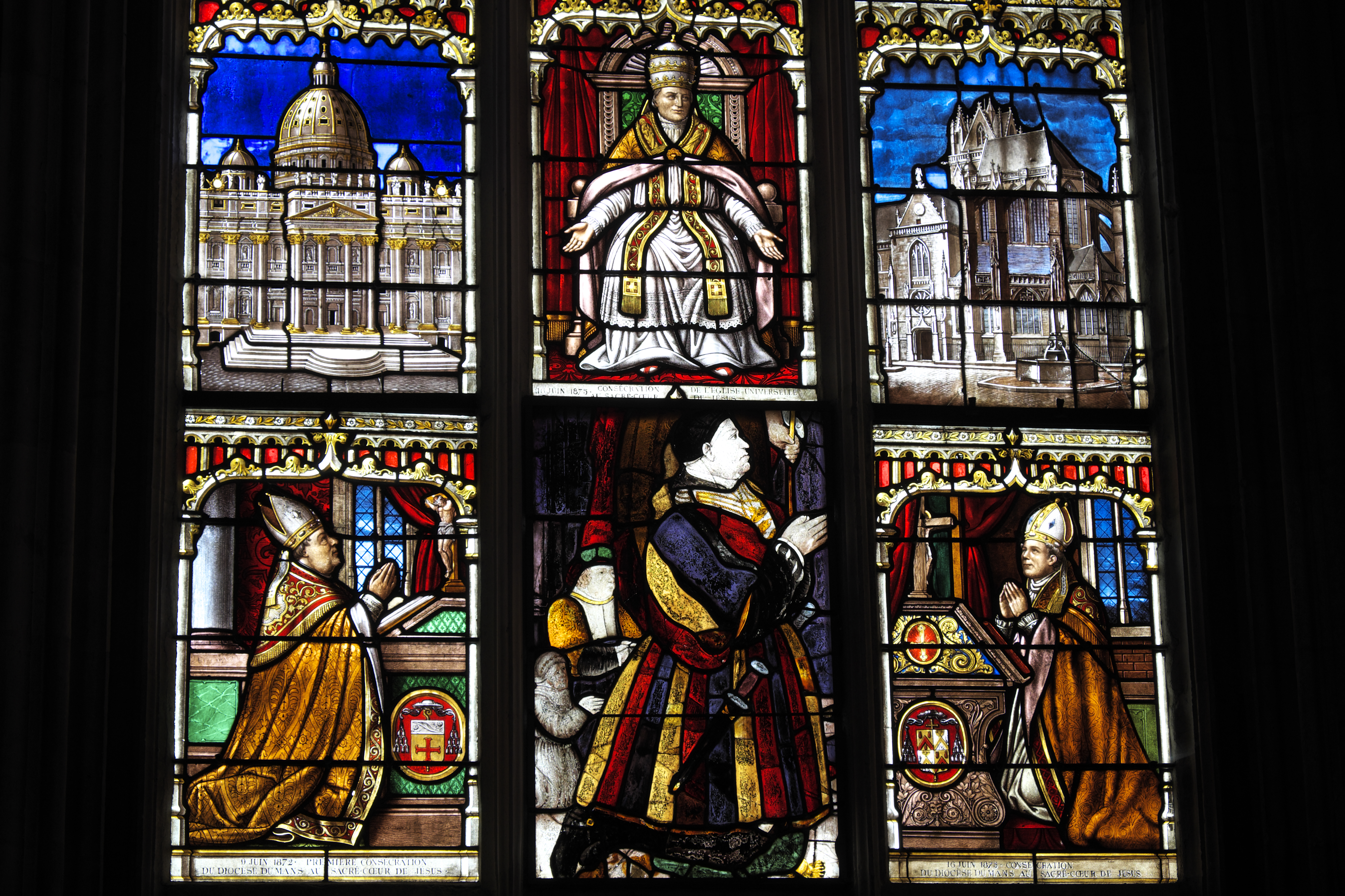 Katholische Pfarrkirche Notre-Dame-des-Marais in La Ferté-Bernard im Département Sarthe (Pays de la Loire/Frankreich), Bleiglasfenster mit Scheiben aus der zweiten Hälfte des 16. Jahrhunderts im Maßwerk, die anderen Scheiben von Eugène Hucher und Édouard Rathouis, von 1875/76 in der Glasmalereiwerkstatt der Karmeliten von Le Mans (Carmel du Mans) geschaffen; Darstellung: Herz Jesu, Papst Pius IX., Petersdom, Kirche Notre-Dame-des-Marais, Stifter; mit Inschrift